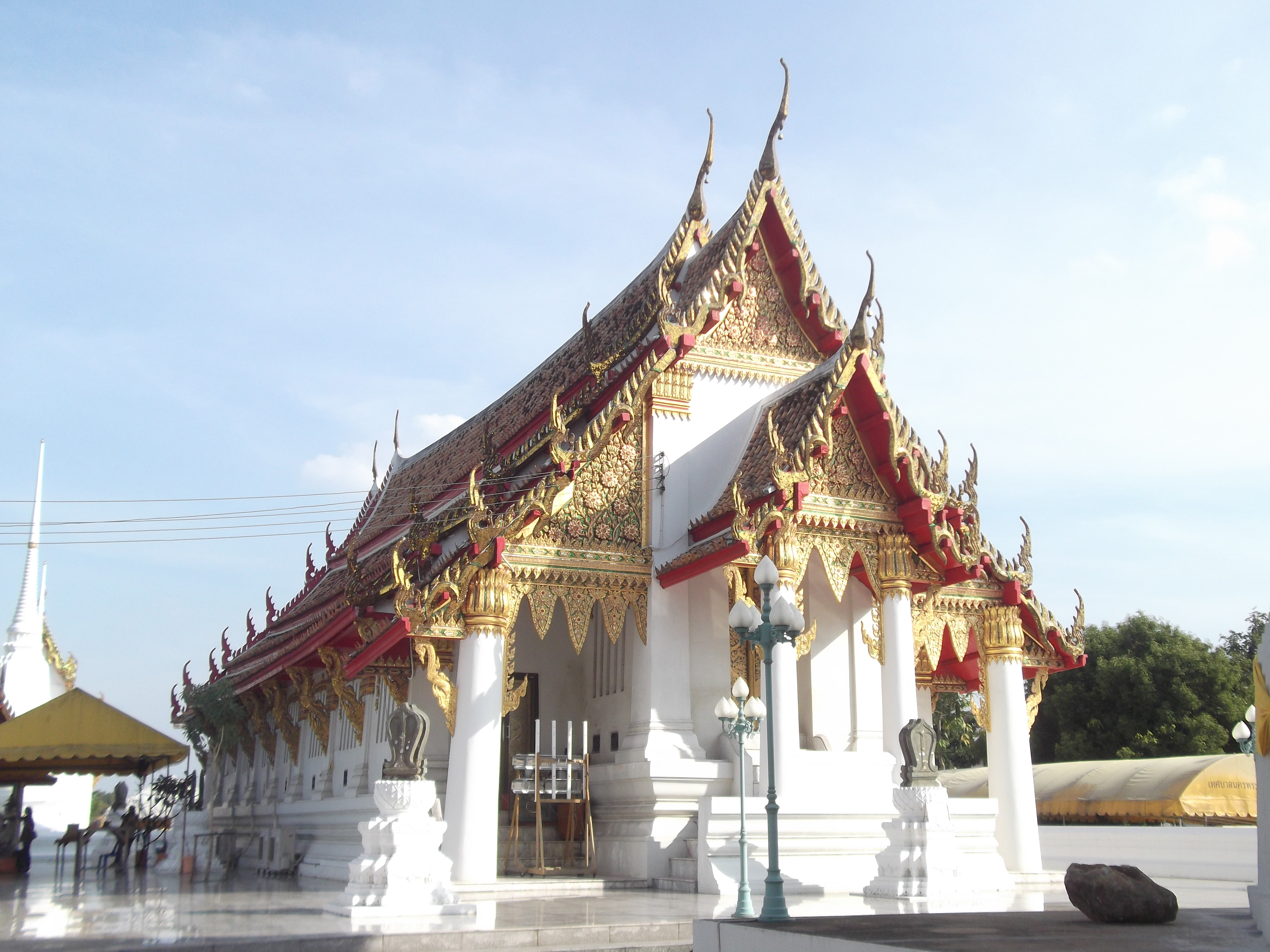 วัดกษัตราธิราชวรวิหาร